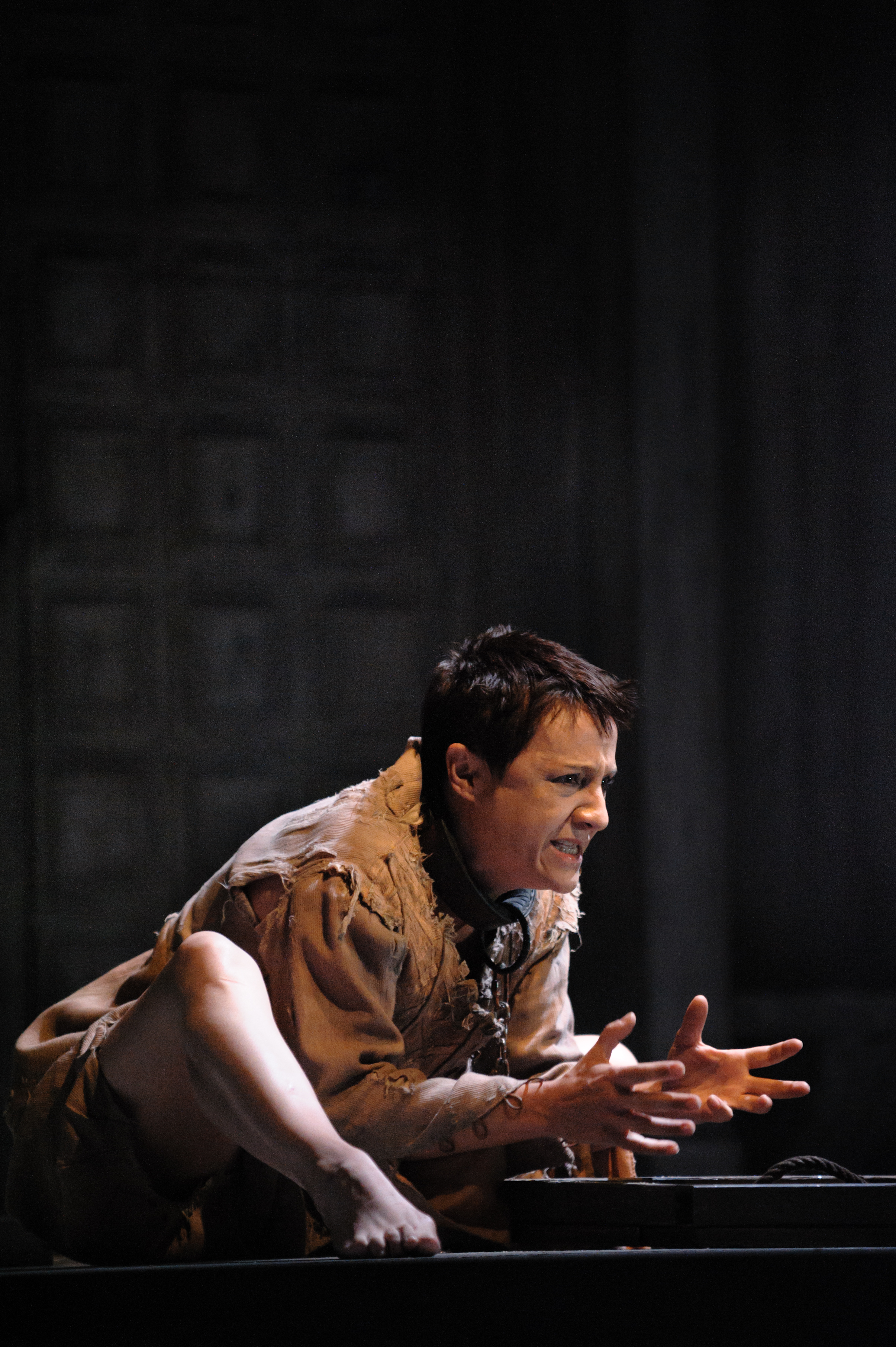 La vida es sueño. 35 edición del Festival de Teatro Clásico de Almagro. Datos de la obra Título: La vida es sueño Autor: Calderón de la Barca Versión: Juan Mayorga Dirección: Helena Pimenta Cía: Compañía Nacional de Teatro Clásico Foto: Guillermo Casas